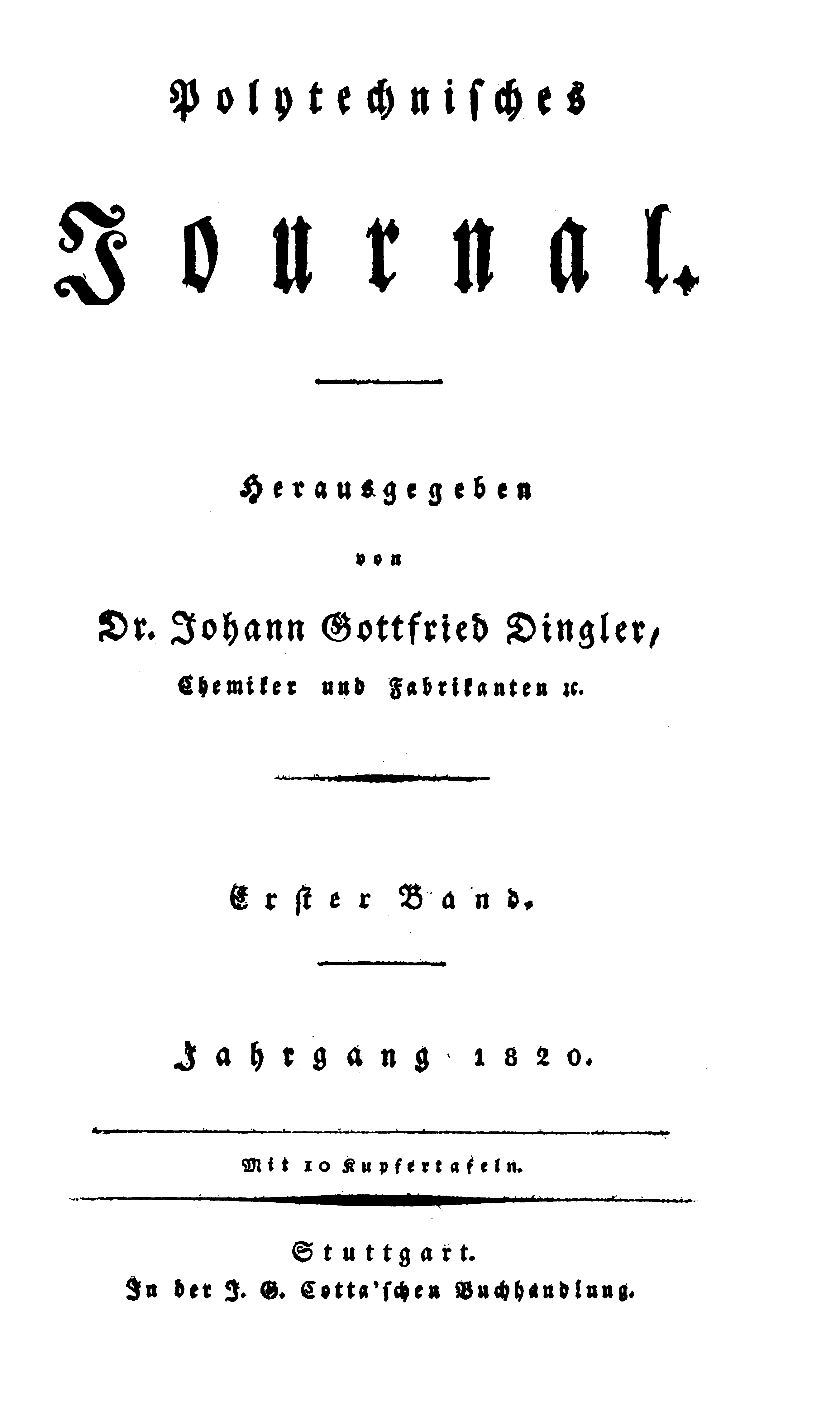 Titelseite der Zeitschrift / Title page of the periodical